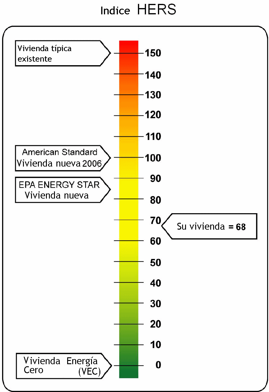 Etiquetado energético HERS para viviendas